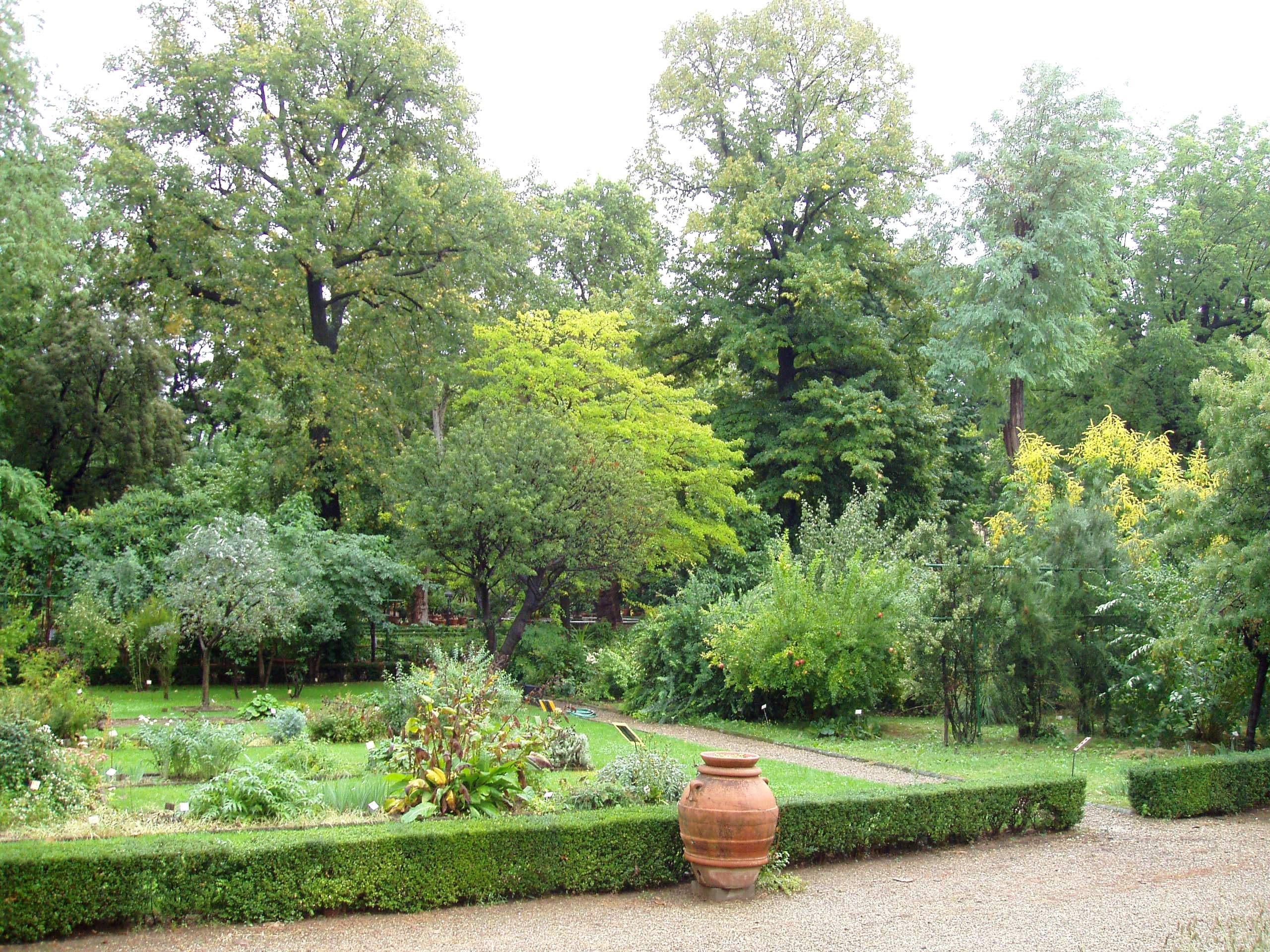 Giardino dei Semplici di Firenze (Orto Botanico di Firenze) - general view. Florence, Italy.